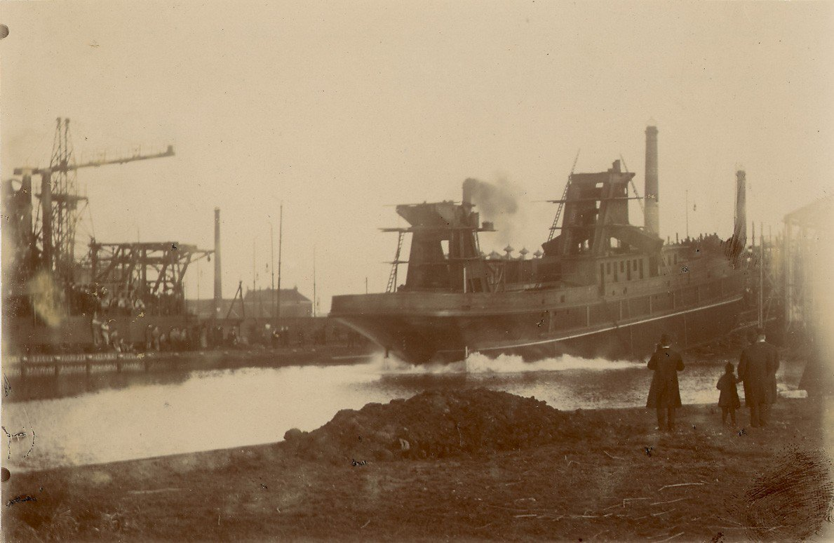 Tewaterlating van de baggermolen "Bromo", bij de werf Conrad. NB. Zie ook: Zondagsblad "Stads-Editie", jrg. 1910, blz. 91. Identificatienummer 54-006279